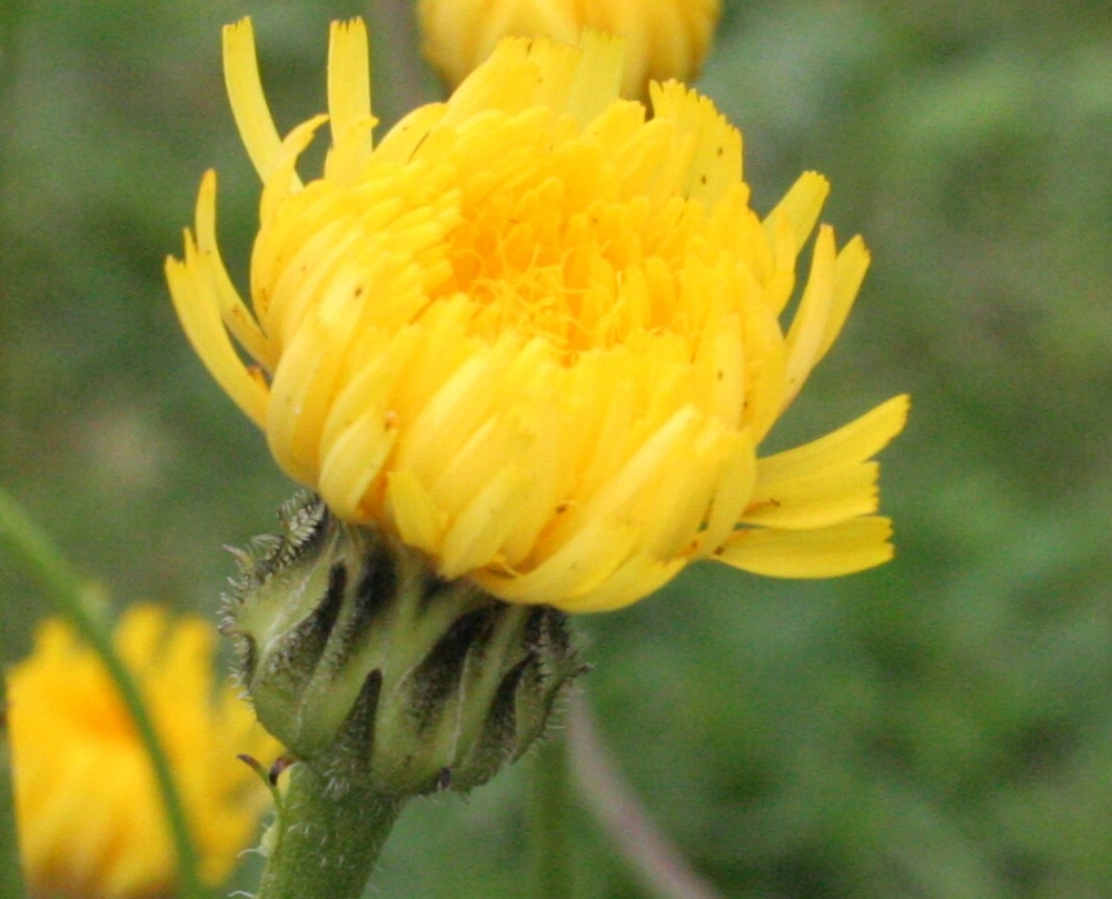 Hypochoeris_maculata (Costolina macchiata) Località : Giardino Botanico Alpino "Giangio Lorenzoni", Pian Cansiglio, Tambre d'Alpago (BL), 1000 m s.l.m.